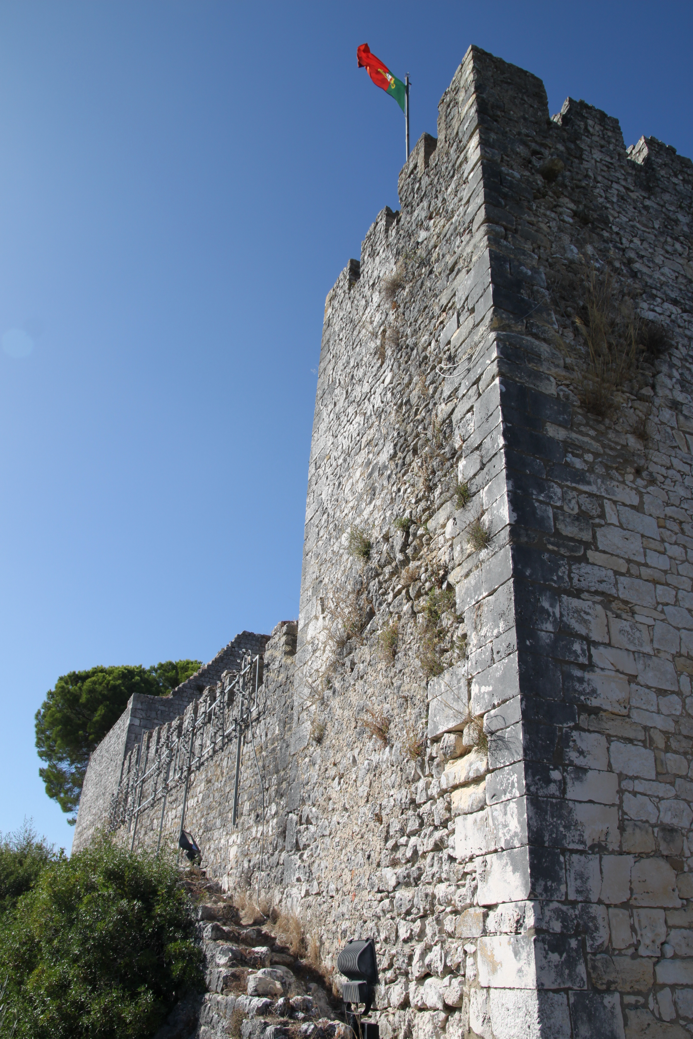 Castelo de Alcanede (ruínas) This file was uploaded for Wiki Loves Monuments in Portugal with the unique identifier 73606.